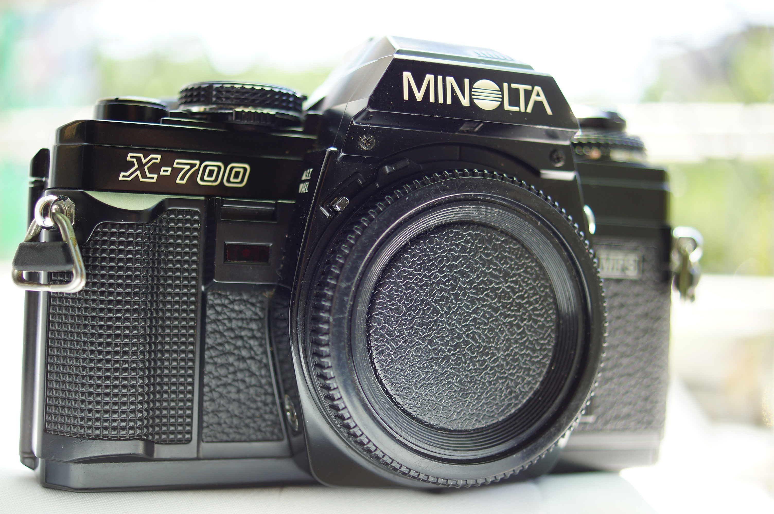 1981年Minolta所發表的單眼相機 X700